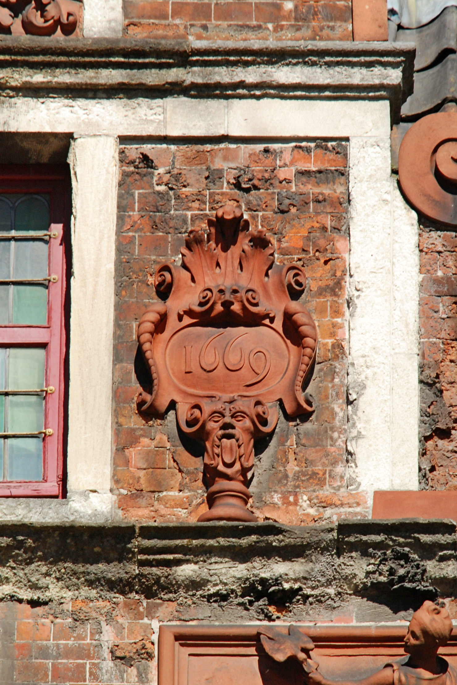 Belgique - Gand - Maison du Cerf Volant ou Maison du Flûtiste (Het Vliegend Hert ou De Fluitspeler, baroque, 1669)